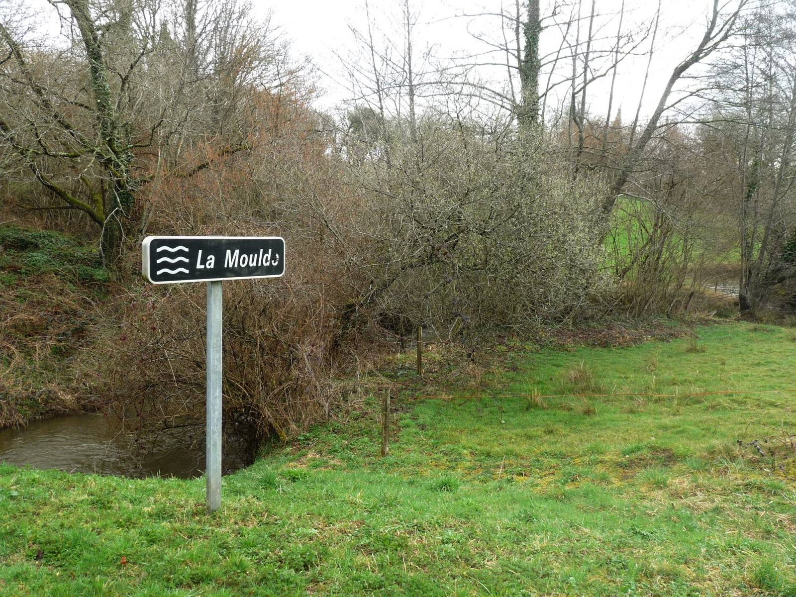 la Moulde en amont de Massignac, Charente, France